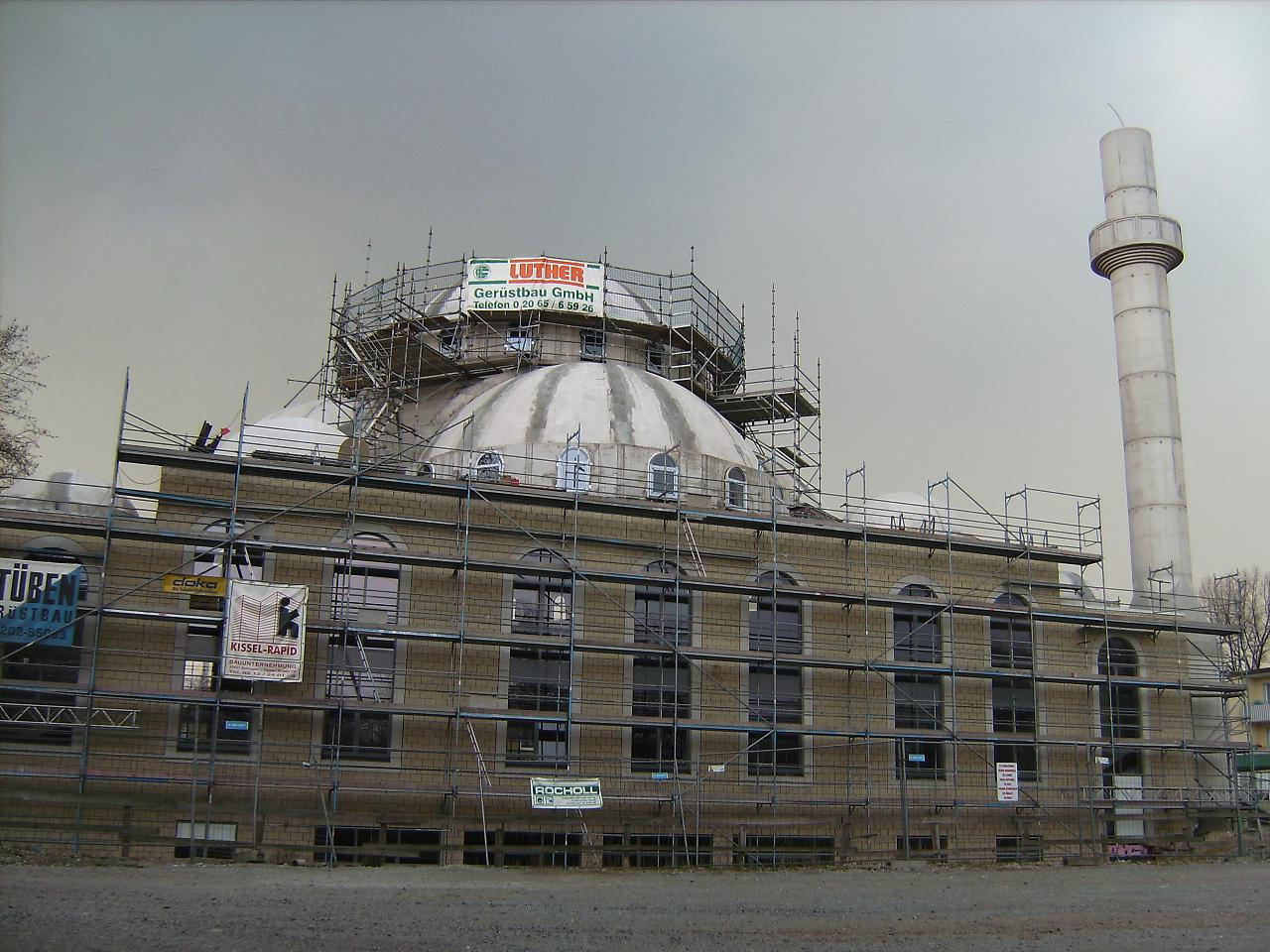 Baustelle der DITIB-Merkez-Moschee in Duisburg-Marxloh